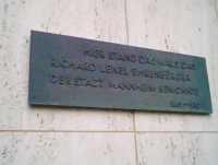 Gedenktafel für Richard Lenel am Hochhaus der Süddeutschen Zucker in der Maximilianstrasse in Mannheim.